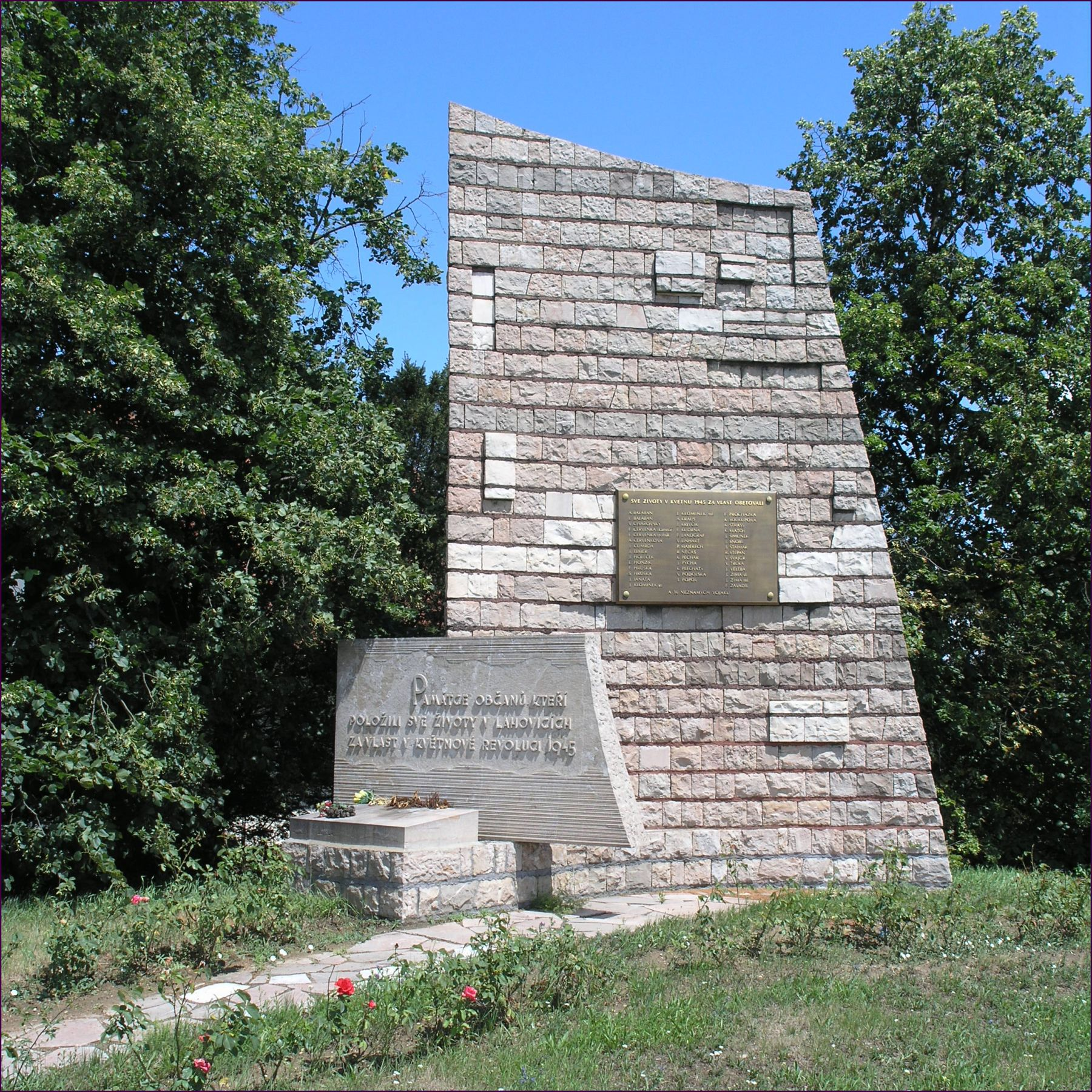 Praha, Lahovičky - Památník obětem květnového povstání roku 1945